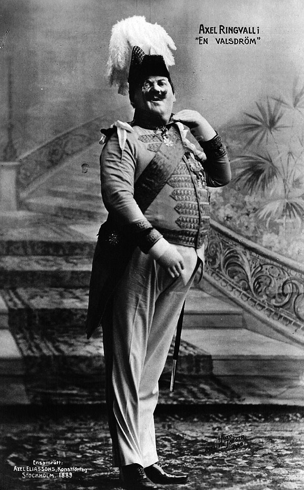 Axcel Ringvall i En valsdröm